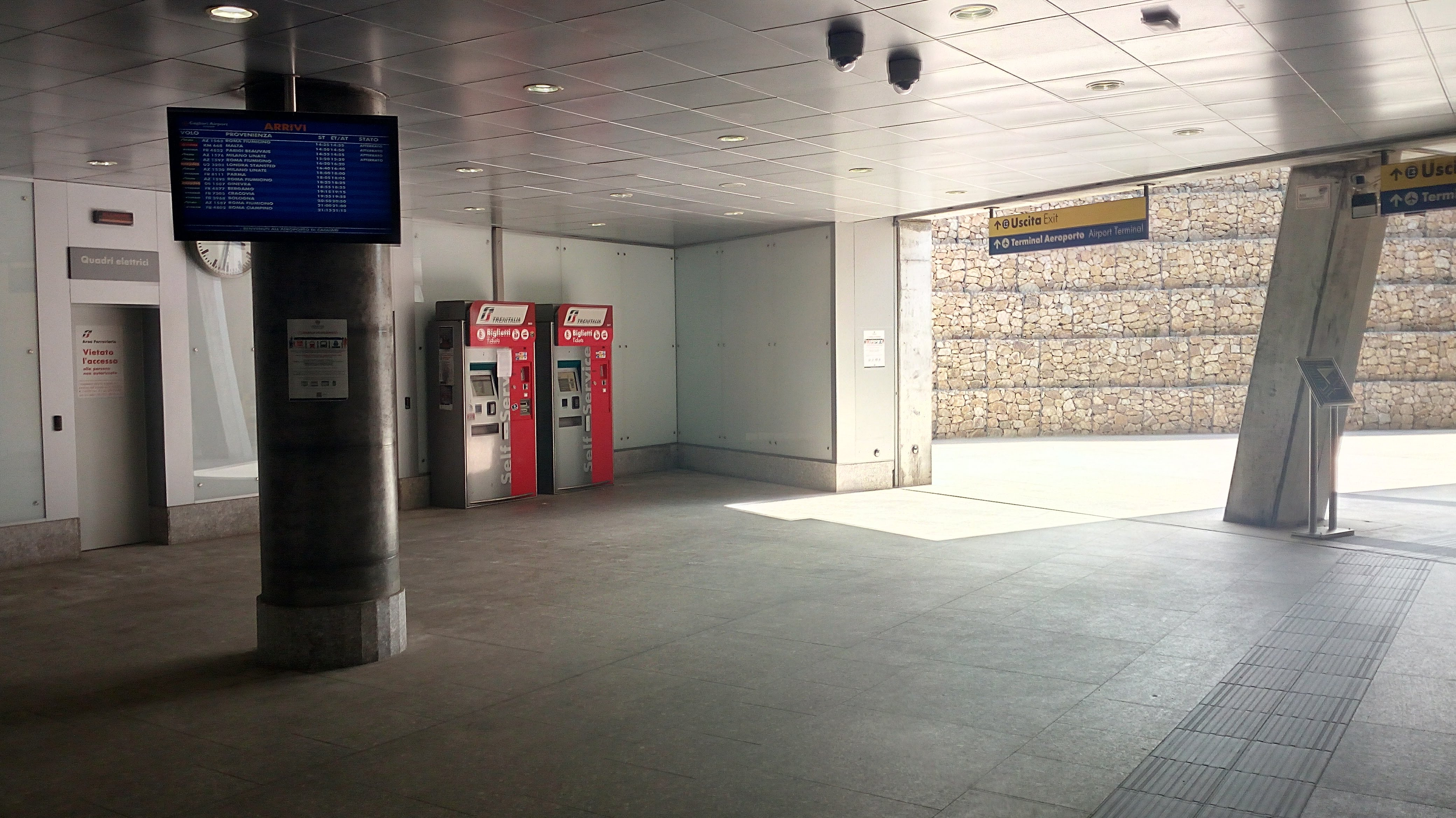 La sala d'attesa sotterranea, fornita di panchine, parcheggio per biciclette e biglietterie automatiche della stazione ferroviaria di Elmas Aeroporto.